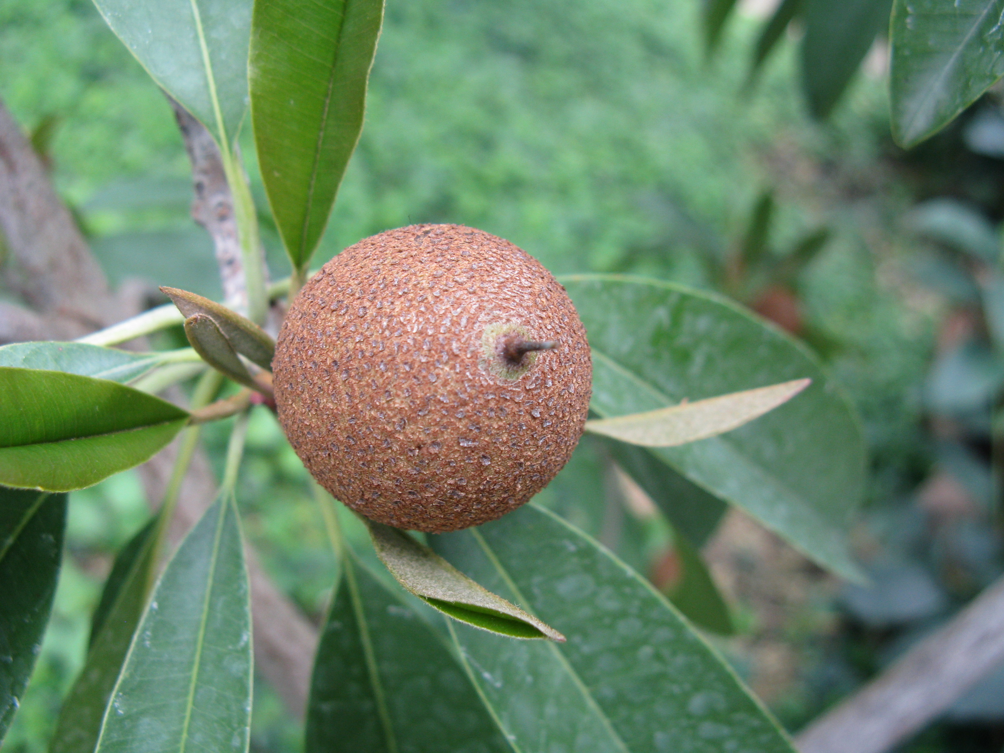 Manilkara zapota